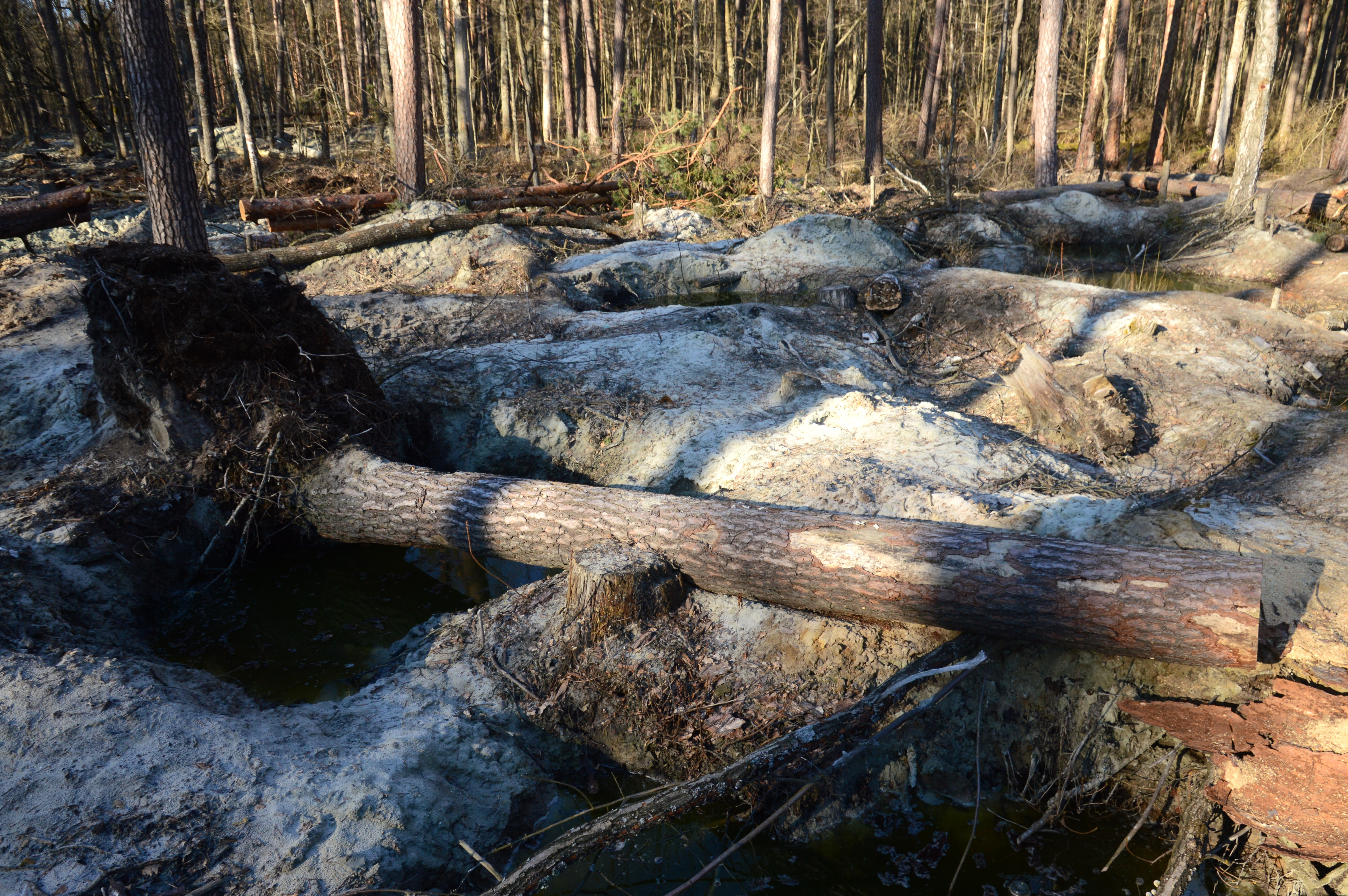 Поясківський, Олевський р-н Житомирської області. Одна з найстаріших лісових ділянок Українського Полісся.